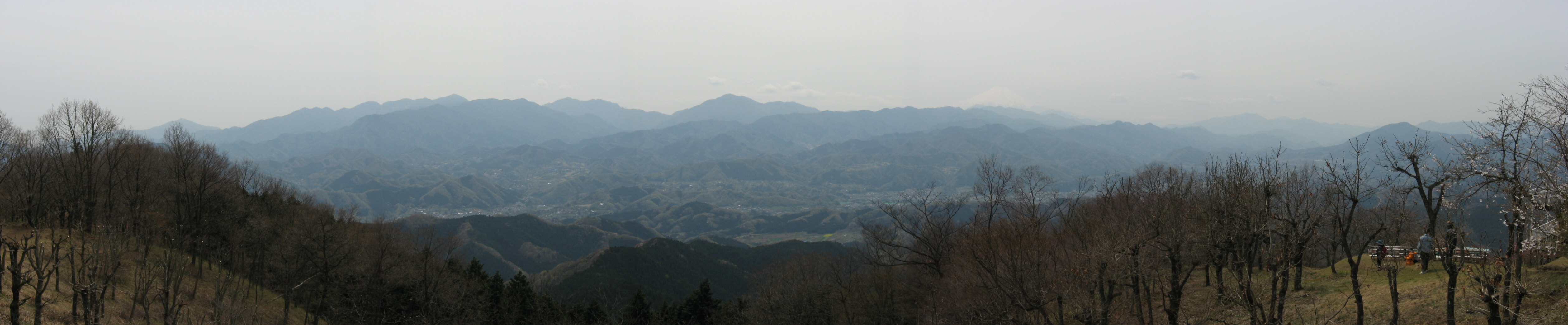 陣馬山からの眺望